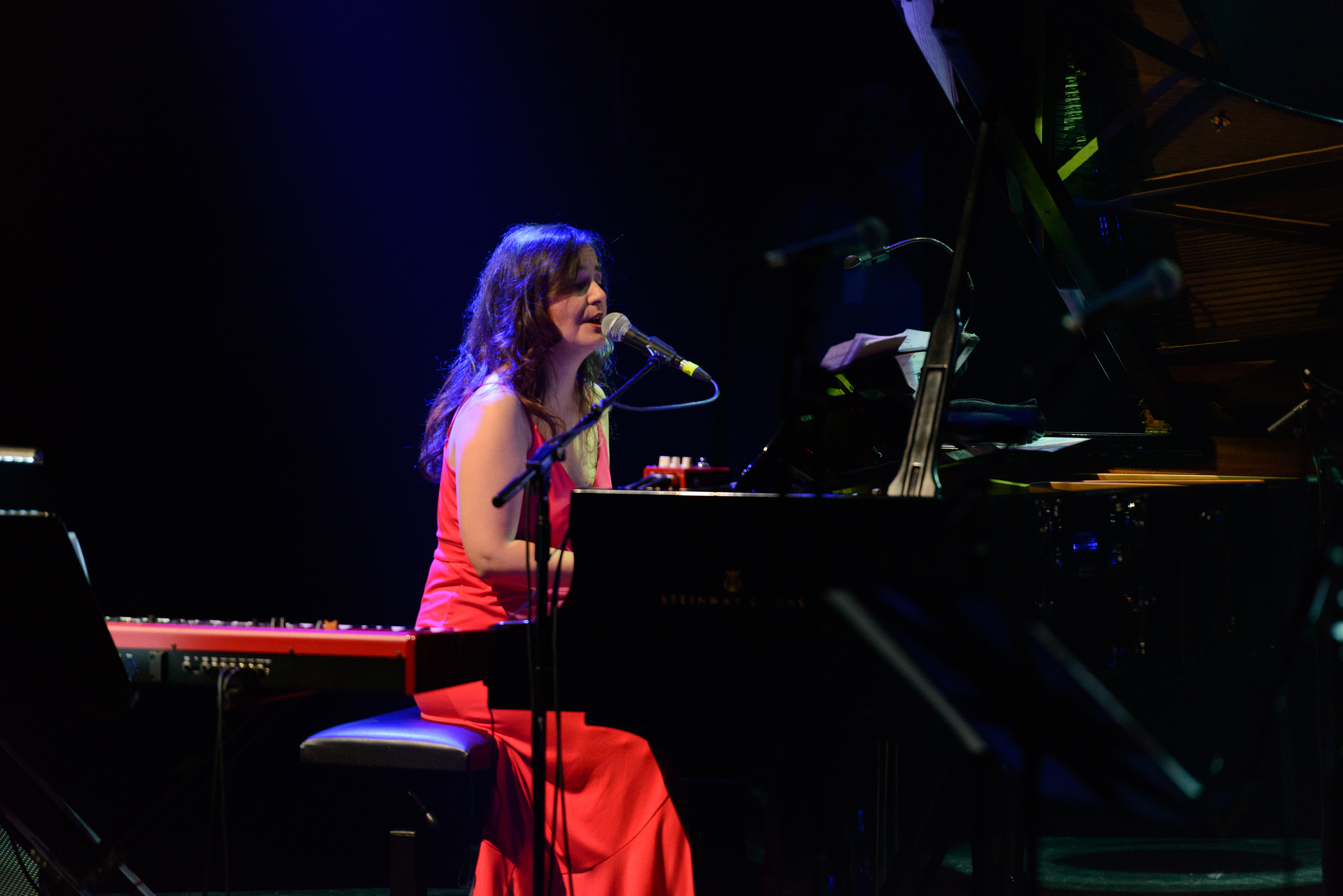 Caz müzisyeni